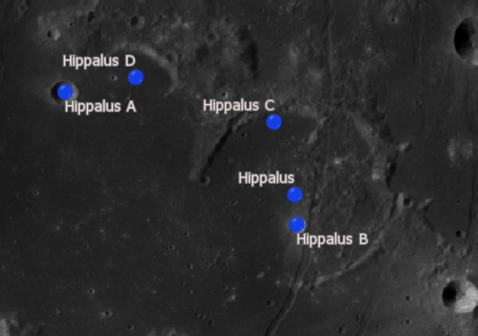 Cráter lunar Hippalus. Cráteres satélite. (Imagen LRO)